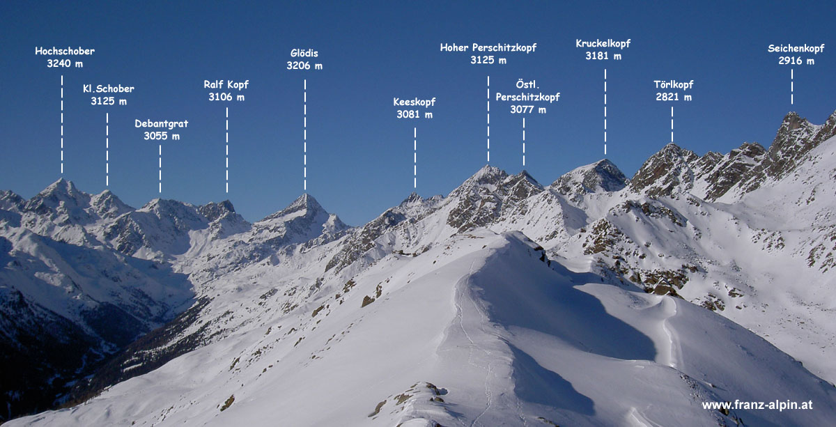 Schobergruppe im Winter aufgenommen vom Straßboden (2401m), Richtung Nordwest.